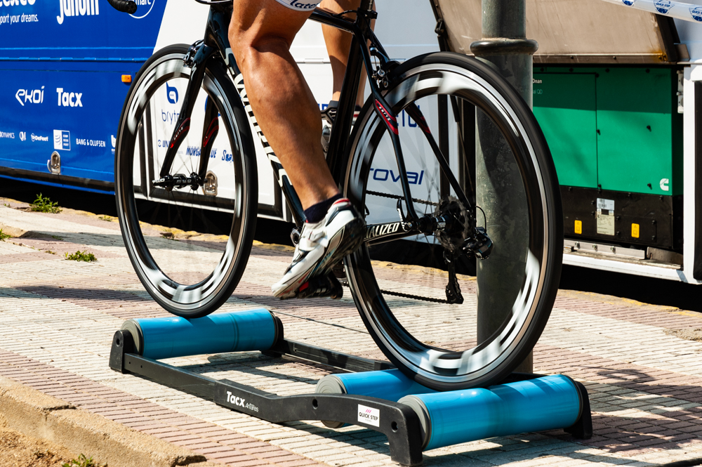 rodillo para bicicleta rulo.